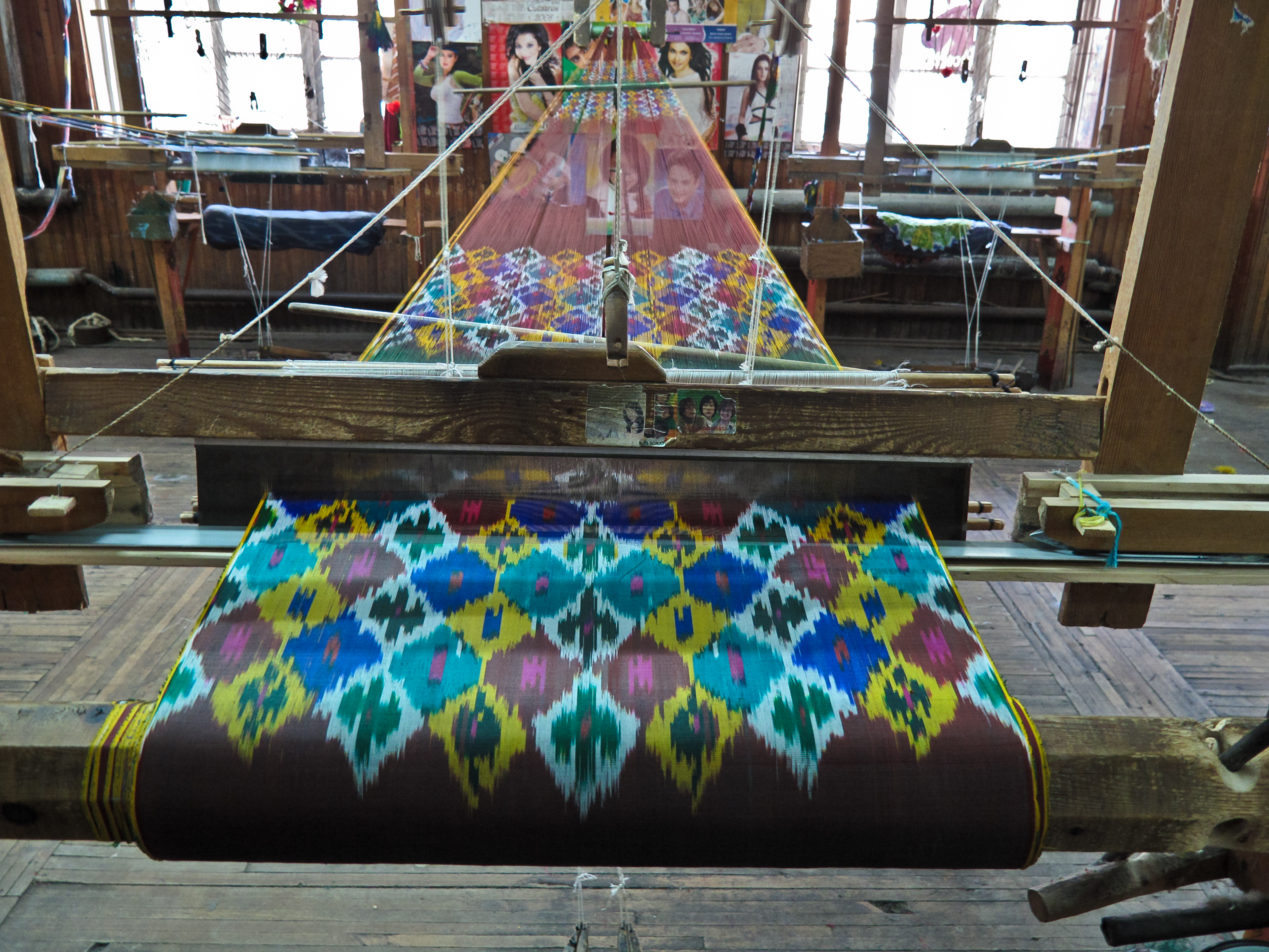 in Margilan, Uzbekistan